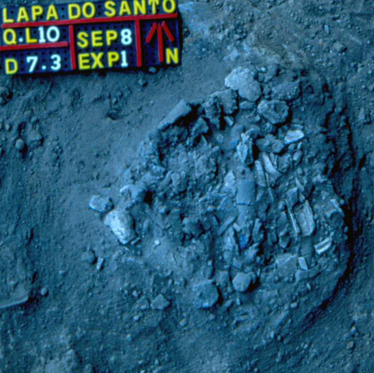 Lapa do Santo - Sepultamento 08 - Foto da Exposicao 1